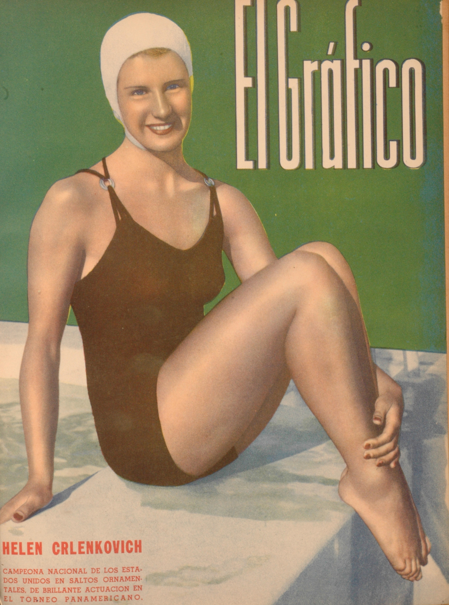 El Grafico del 02 de Febrero de 1940. Edicion 1073